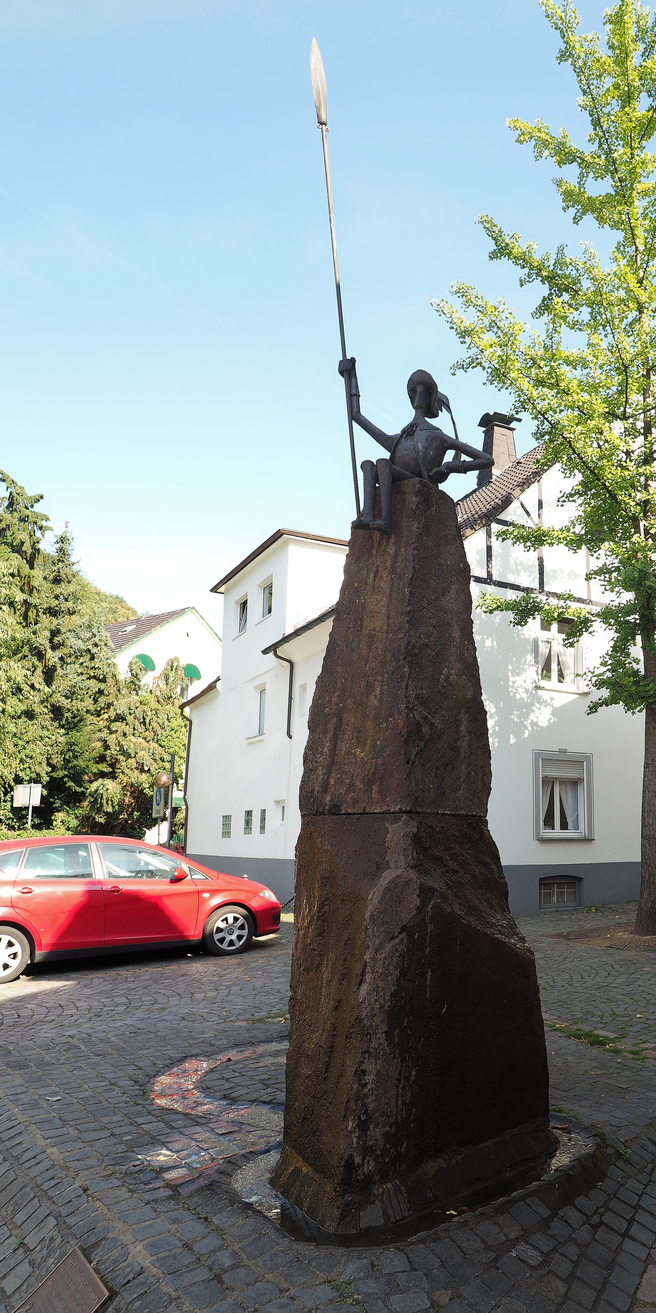 Brunnen als Denkmal für Graf Engelbert III. von der Mark (1347-1391), Graf-Engelbert-Straße, Plettenberg. Der Brunnen entstand auf privater Initiative.